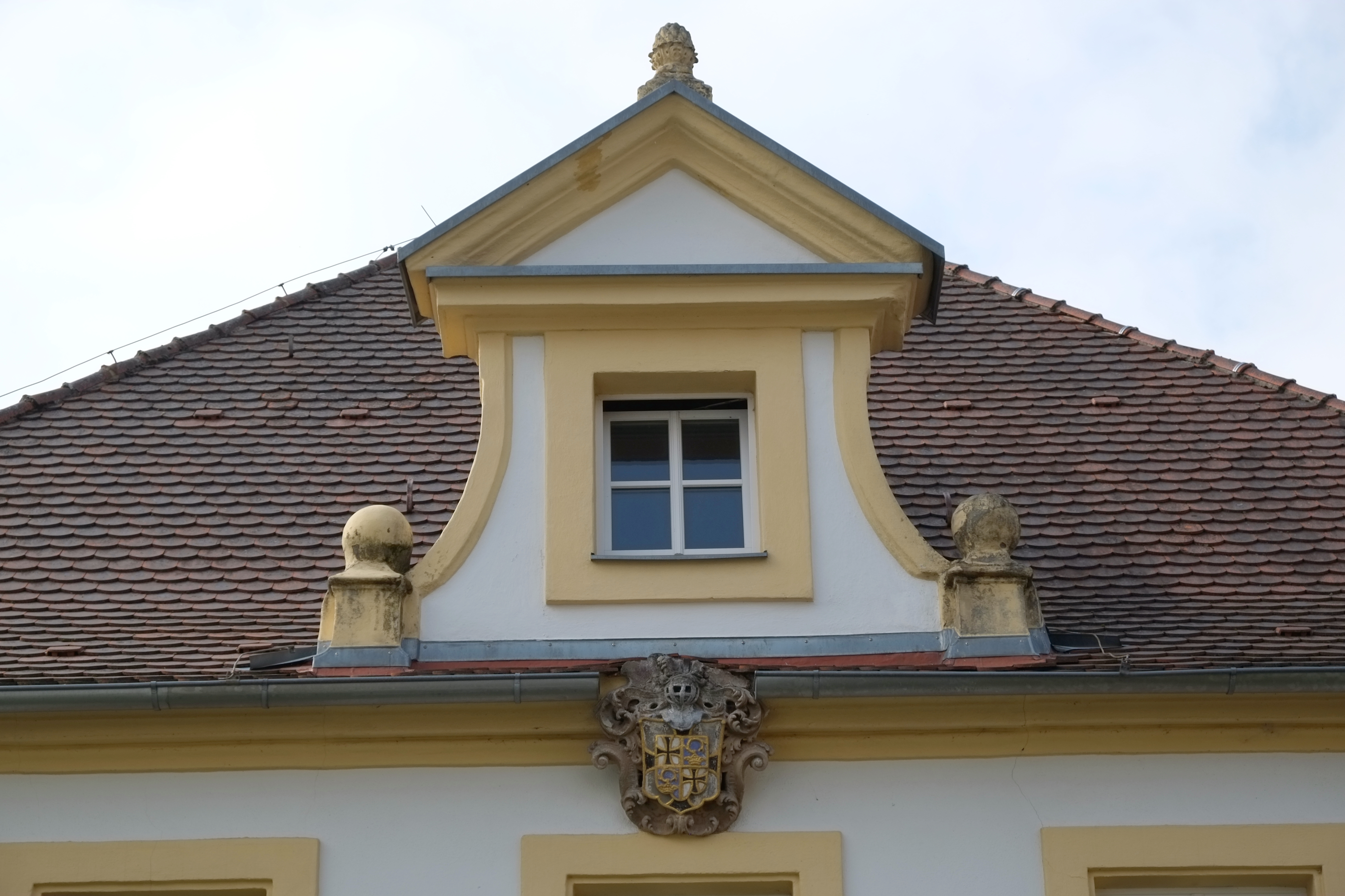 Evangelisches Pfarrhaus in Absberg im Landkreis Weißenburg-Gunzenhausen (Bayern/Deutschland)